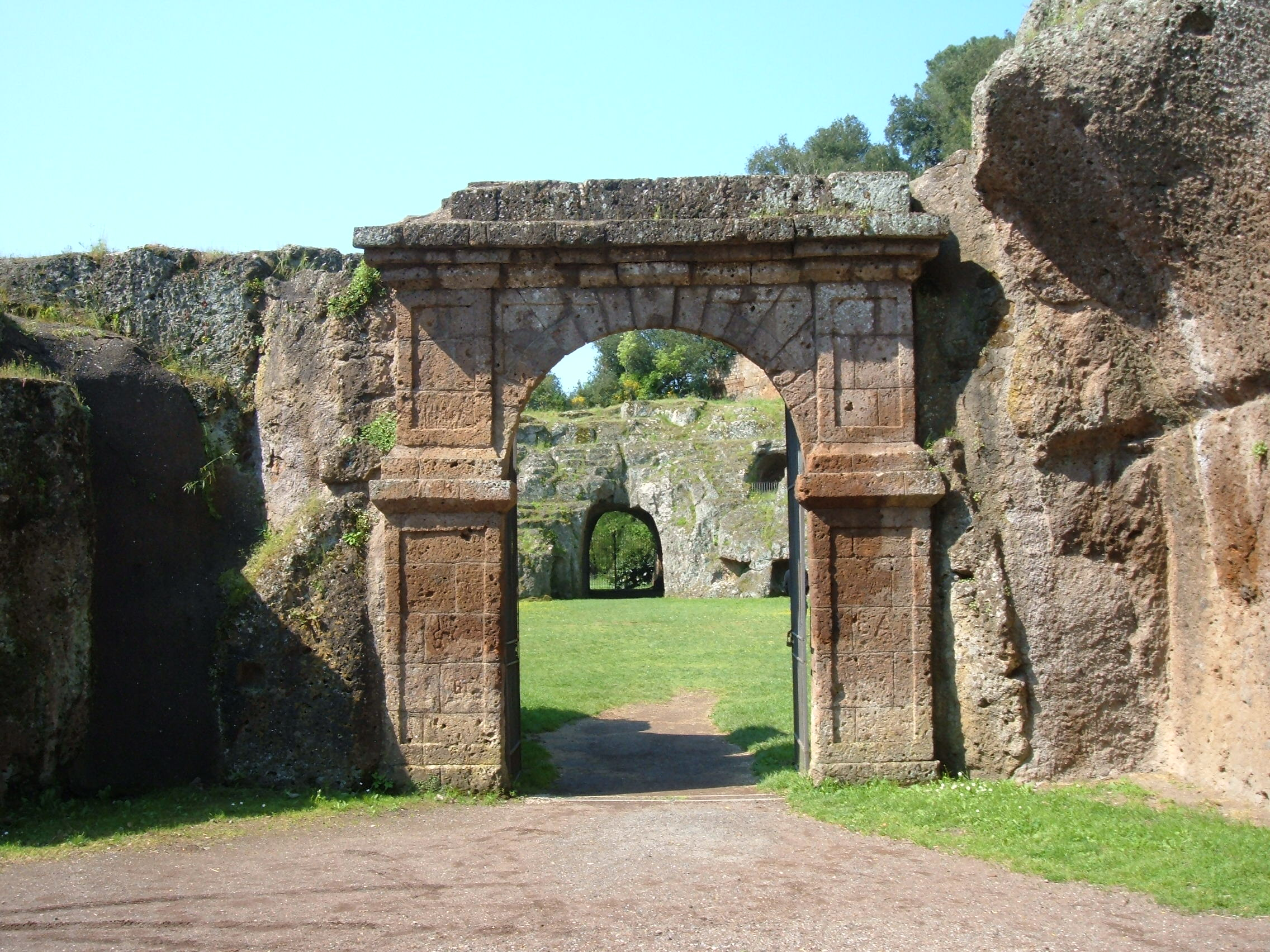 Anfiteatro di Sutri.